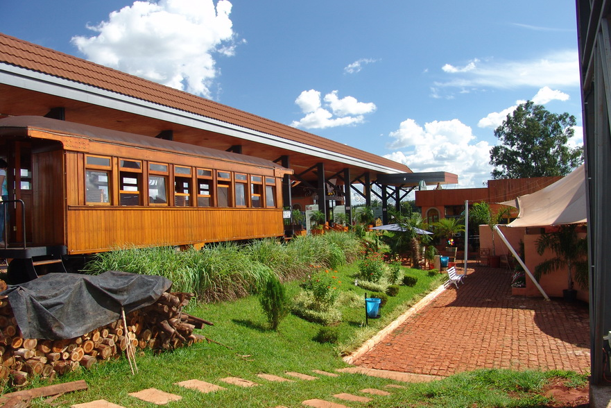 Imagem do Museu do Café no município de Santa Cruz do Rio Pardo, estado de São Paulo, Brasil.